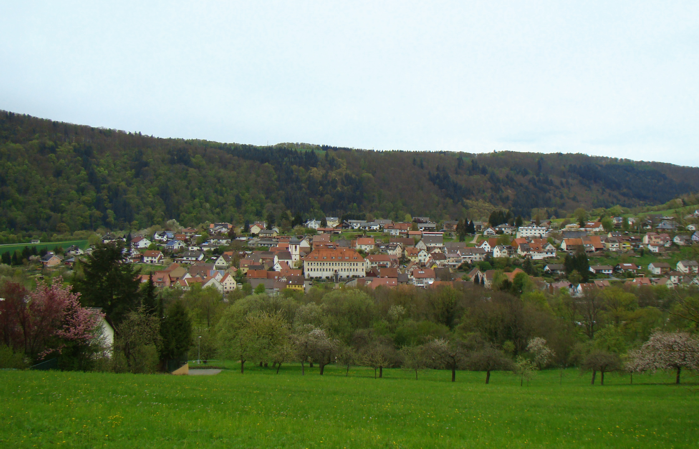 Blick von Mörtelstein auf Binau